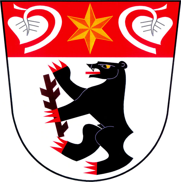 Znak obce Tuchlovice